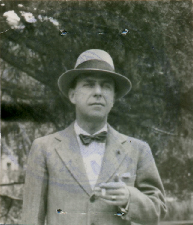 El diplomático chileno Carlos Morla Lynch fotografiado en Madrid, España